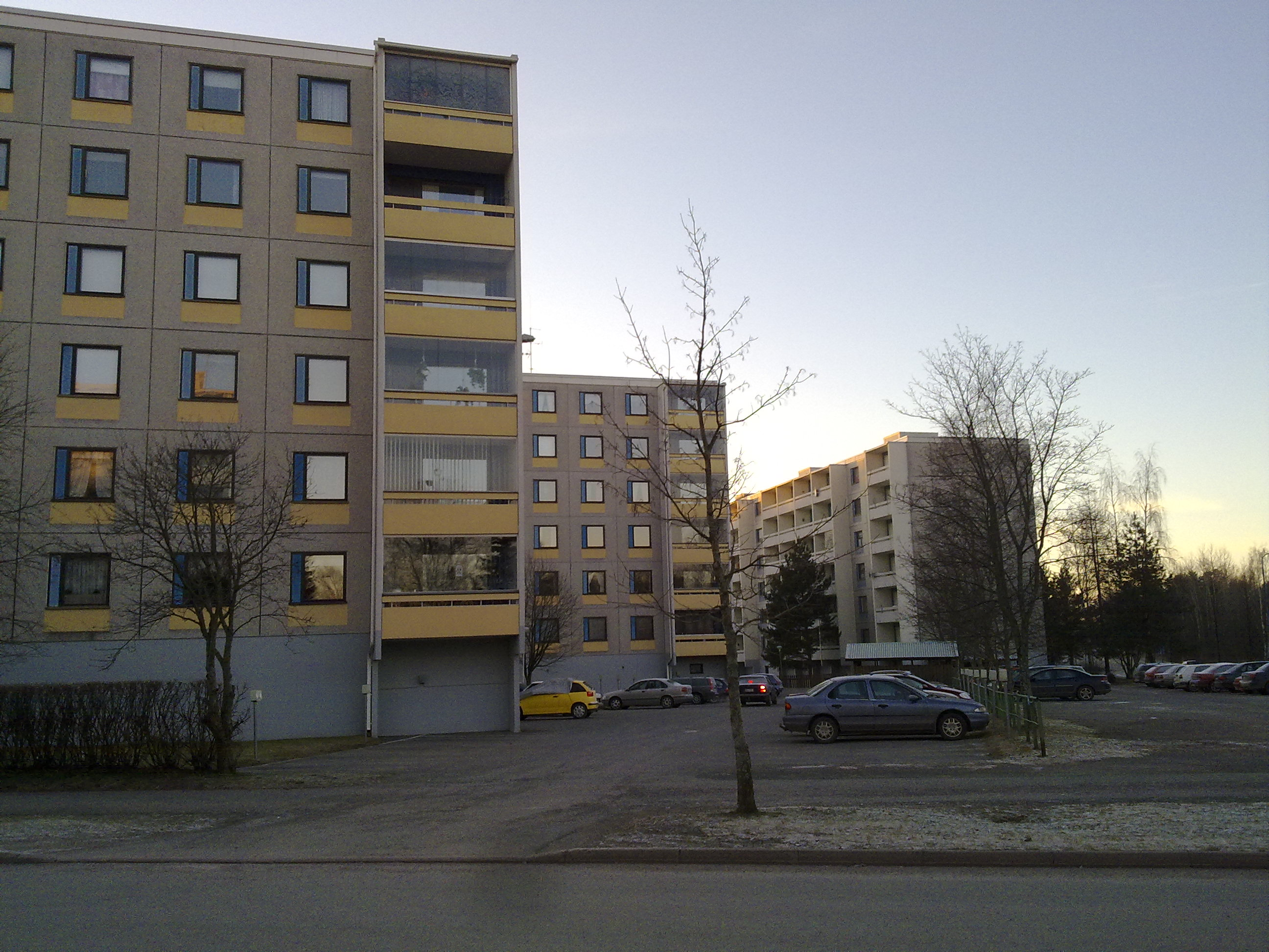 Kerrostaloja Pihlavassa.